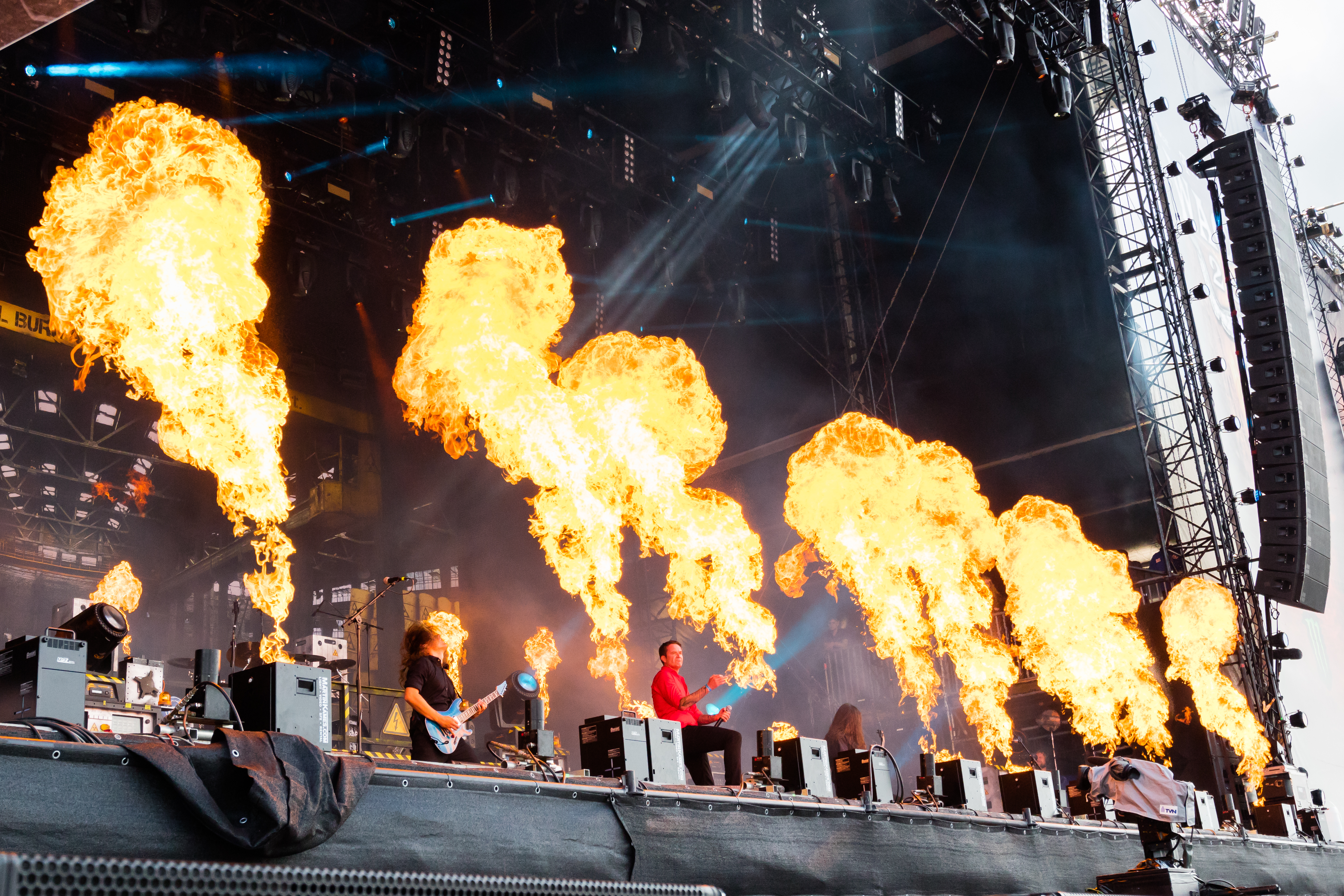 Heaven Shall Burn during Wacken Open Air at Schleswig-Holstein, Wacken, , Germany on 2017-08-05, Photo: Sven Mandel